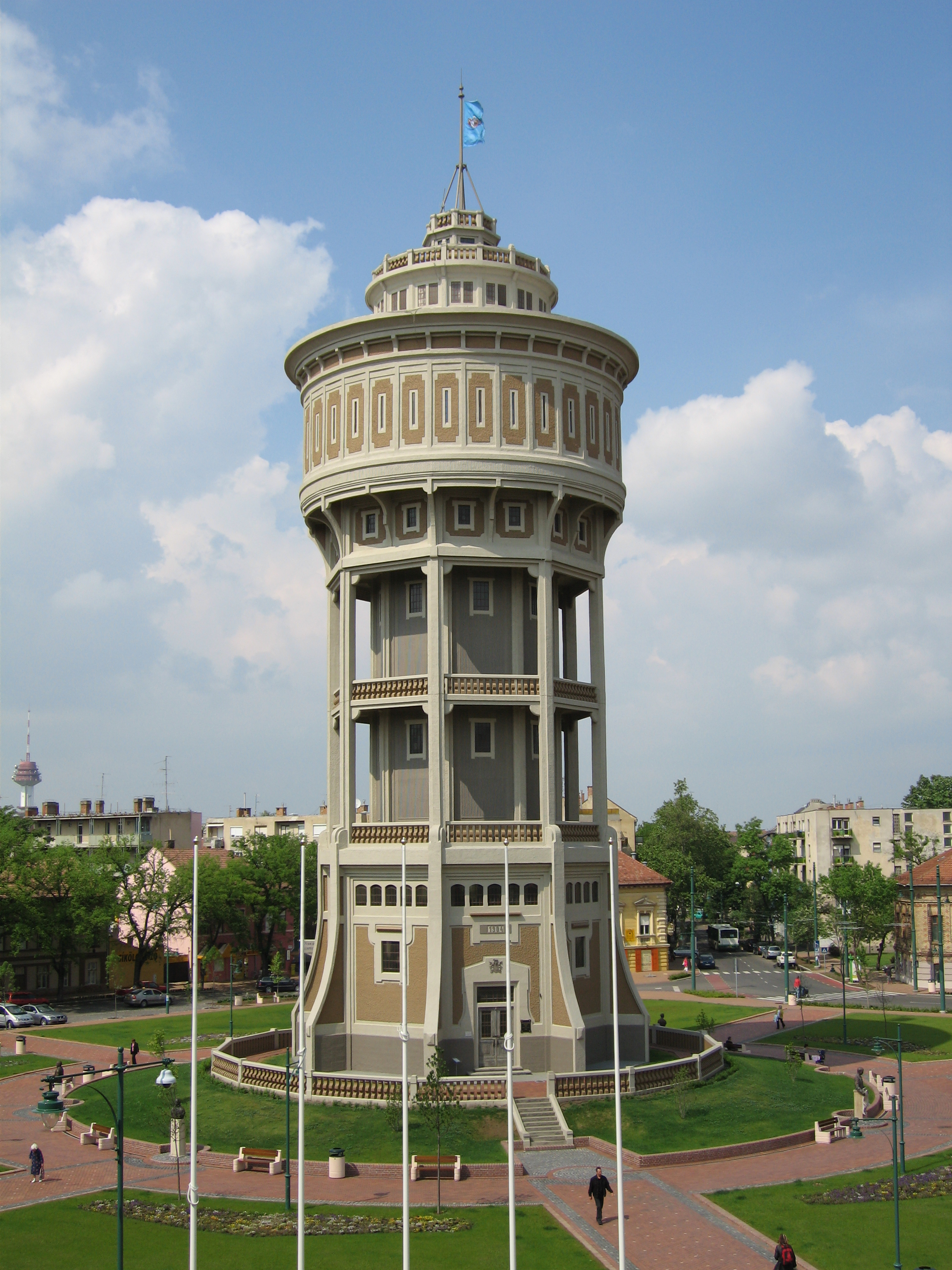 A szegedi víztorony a Szent István téren (épült 1903–1904-ben Zielinski Szilárd terve alapján, felújítását 2006-ban fejezték be)